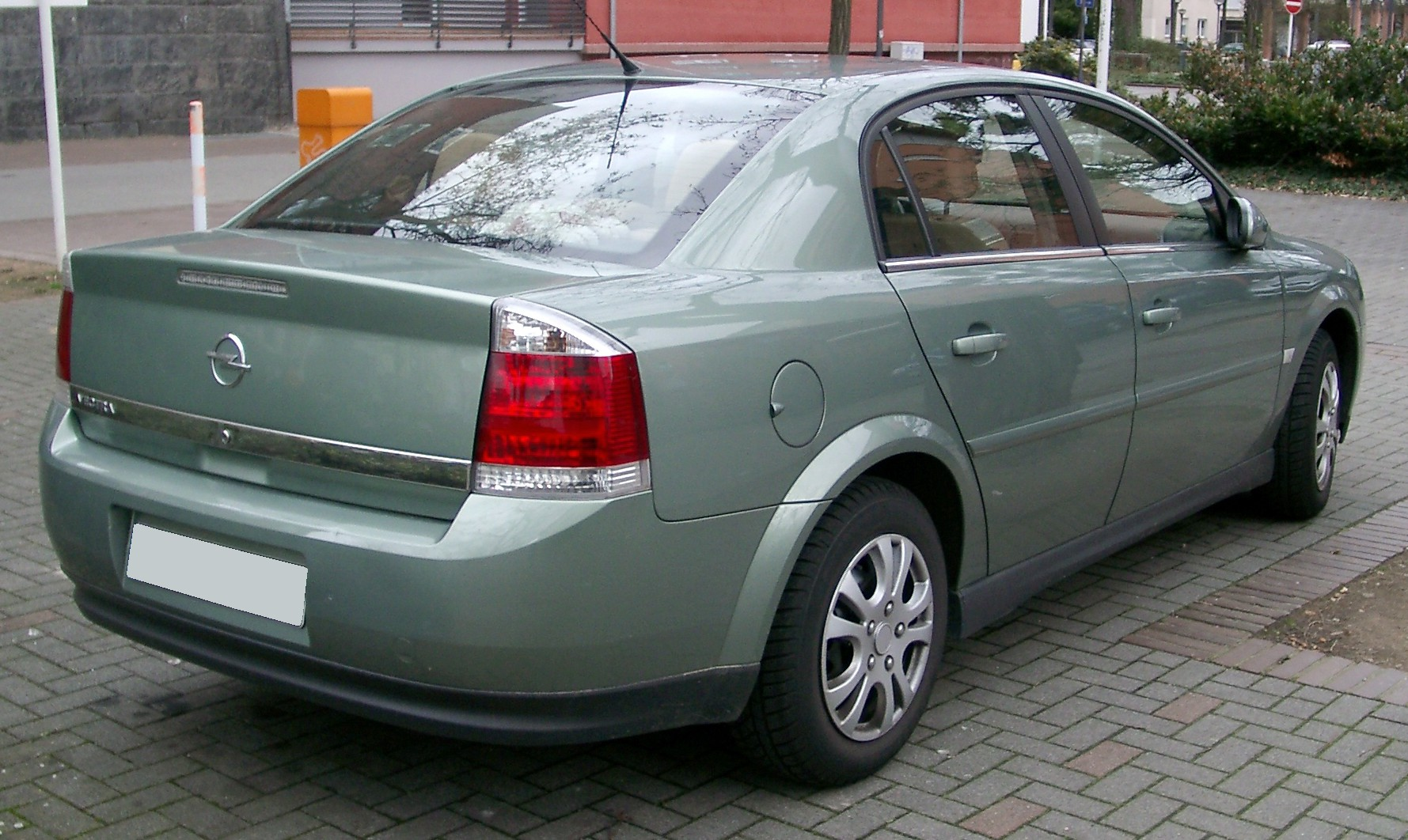 Opel Vectra C Vorfacelift